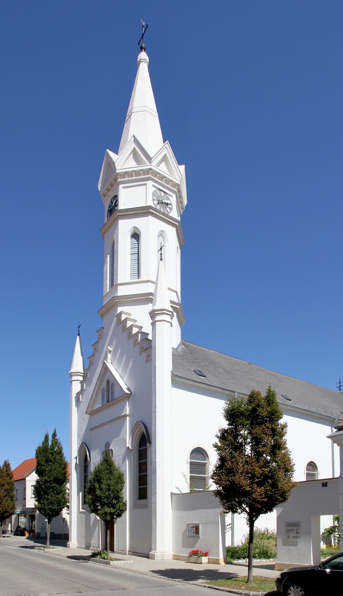 Die Evang. Pfarrkirche A.B. von Mörbisch am See.